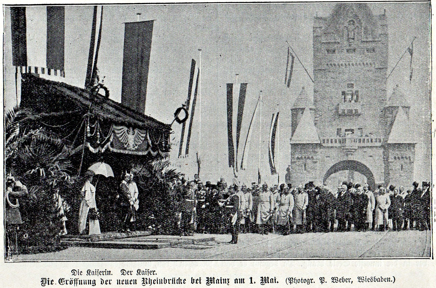 Kaiserbrücke Mainz, Eröffnung, 1. Mai 1904